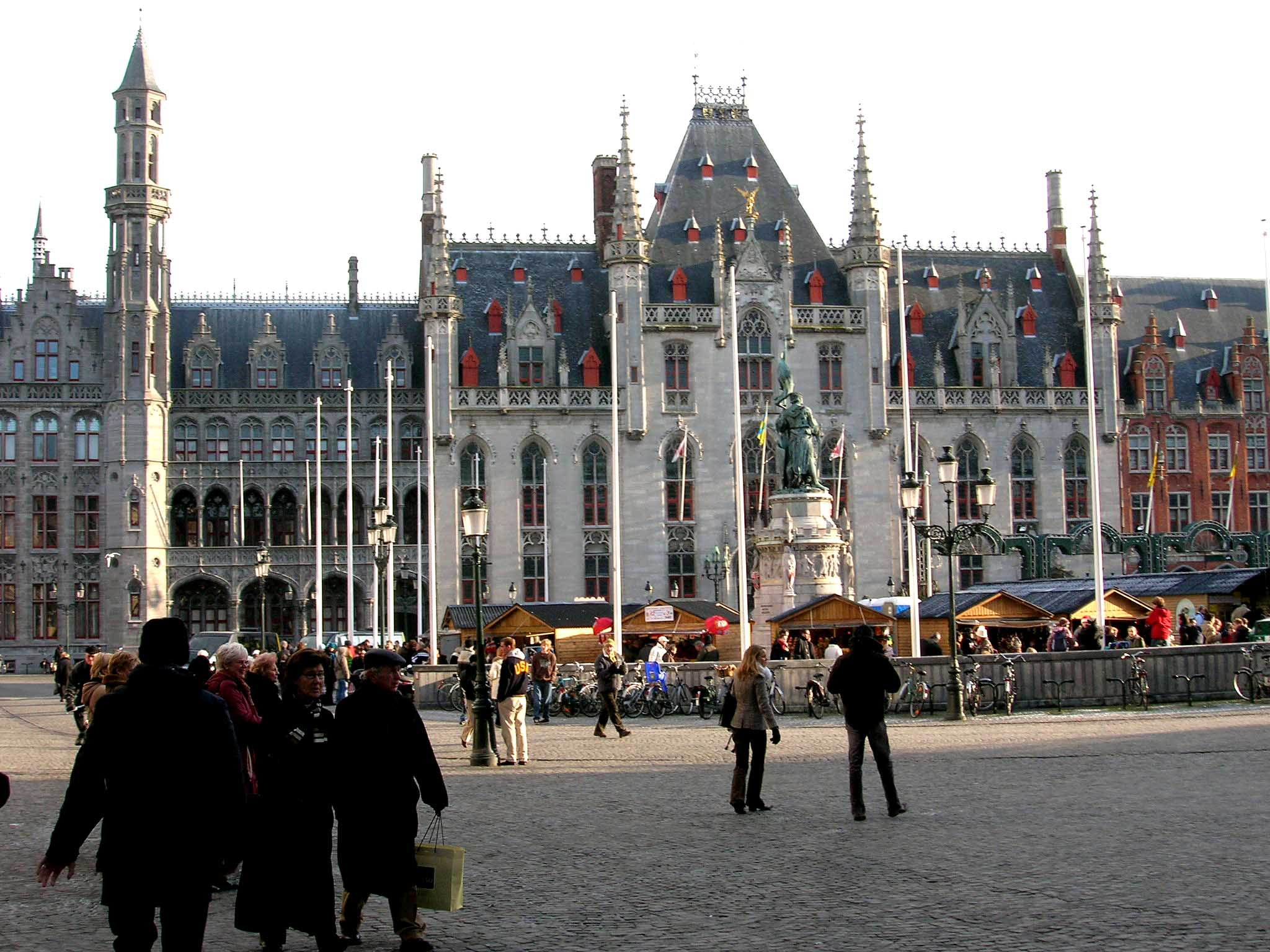 Bruges, Maartplaz.